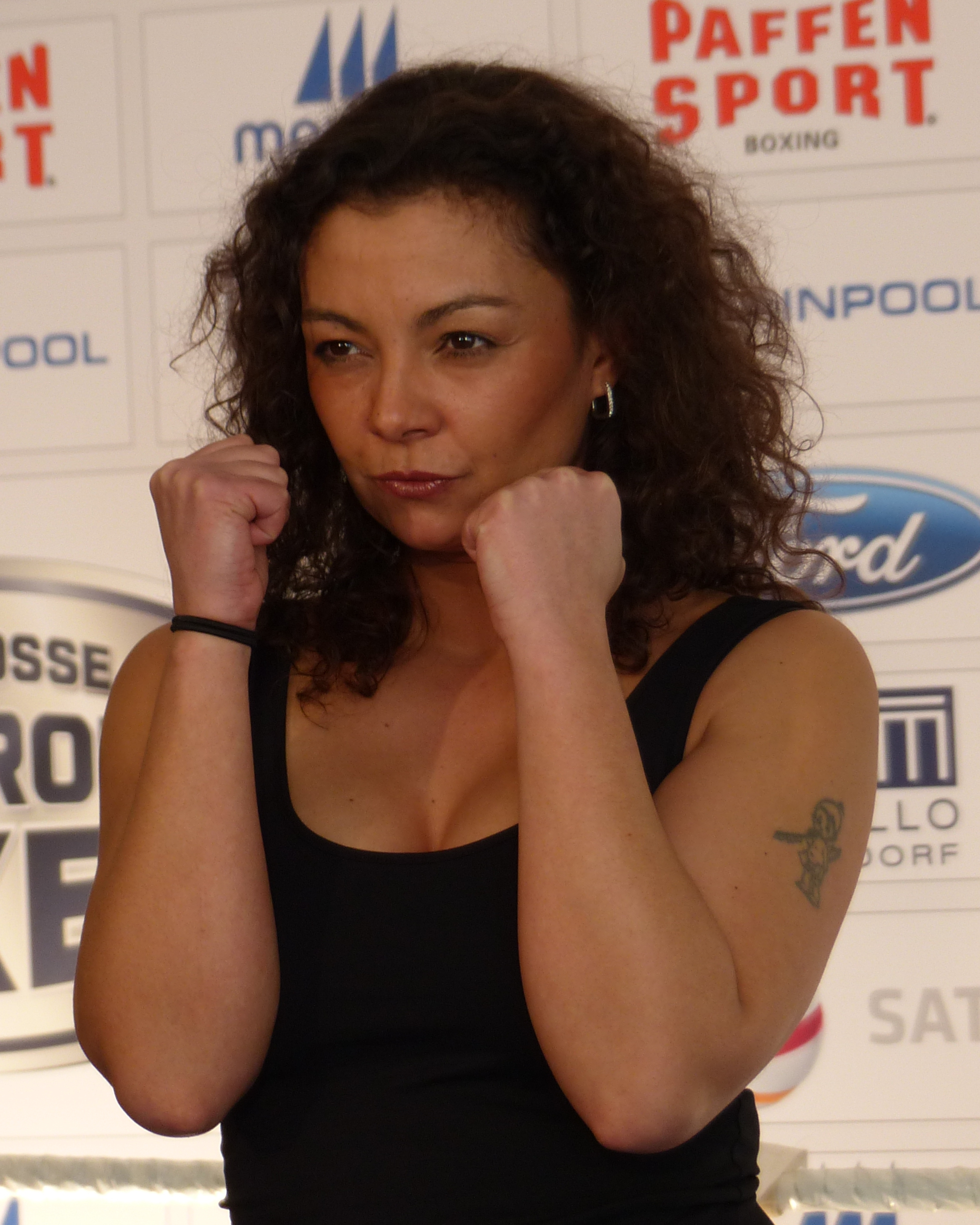 Marlene Tackenberg („Jazzy“) beim offiziellen Wiegen fürs Promiboxen 2013